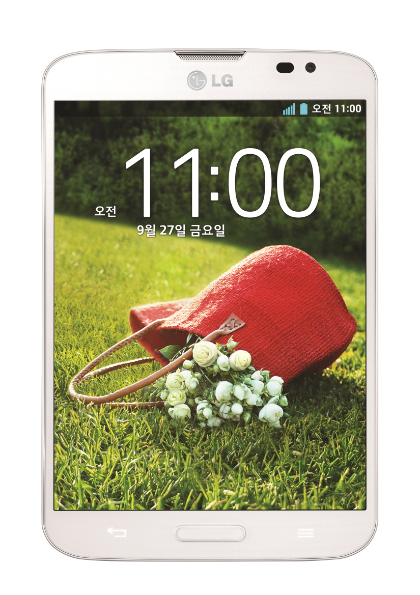 ■ 5.2인치 4:3 화면비, 이달 27일부터 이통 3사 순차 출시 □ 전작과 동일한 길이와 너비에 디스플레이는 0.2인치 더 큰 5.2인치 탑재 □ 눈이 시원한 4:3 화면비로 최적의 가독성 제공 ■ 러버듐 펜 내장, 쓰기?그리기 등 메모 사용성 대폭 확대 □ 펜을 꺼내면 ‘Q메모’, ‘노트북’ 등 메모 관련 UX 자동 정렬 □ 펜 뿐만 아니라 손으로도 언제 어디서나 손쉽게 메모 가능 ■ 진화된 전용 커버 ‘퀵뷰™ 케이스’ □ 반투명 커버 소재 적용으로 디자인과 사용편의성 동시에 잡아 □ 7가지 애니메이션 효과로 커버 열지 않고도 시간, 날짜, 통화, 메시지 수신 알림 등 확인 ■ 직관적인 UX, 감동-자신감-즐거움 제공 □ 노크온, 게스트 모드, 스마트 링크, 플러그 앤 팝 등 ■ 강력한 하드웨어 스펙 □ 퀄컴 스냅드래곤 800 프로세서 탑재 □ 13MP 카메라가 제공하는 선명한 화질 □ 원음에 가까운 깨끗한 음질의 하이파이 사운드 ※ Social LG전자 에서 관련 보도자료를 확인하실 수 있습니다.